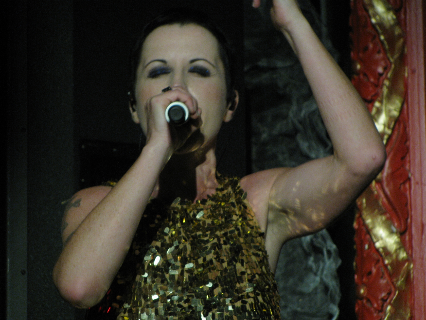 2009 Montreal, QC